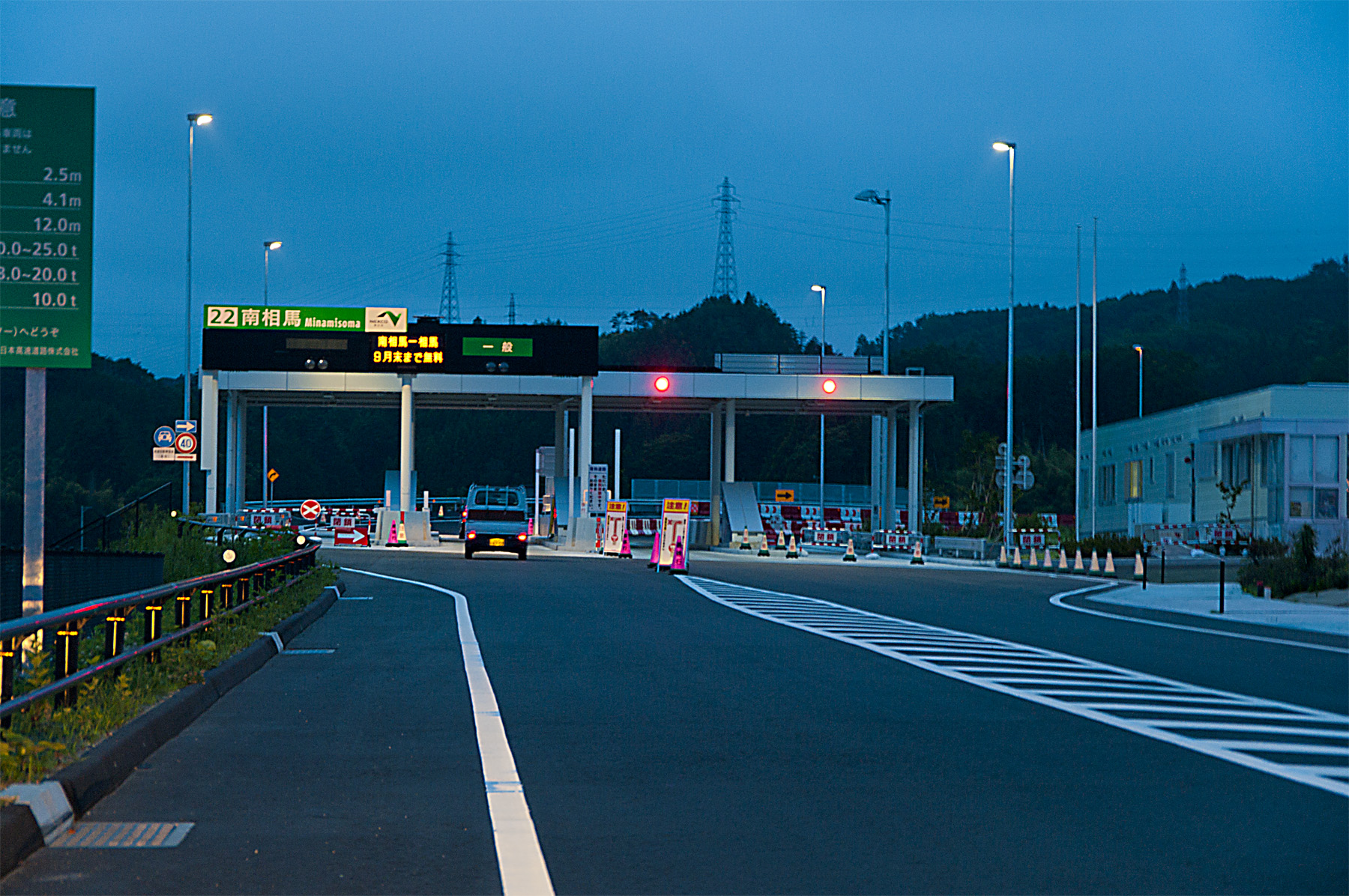 常磐自動車道南相馬インターチェンジ